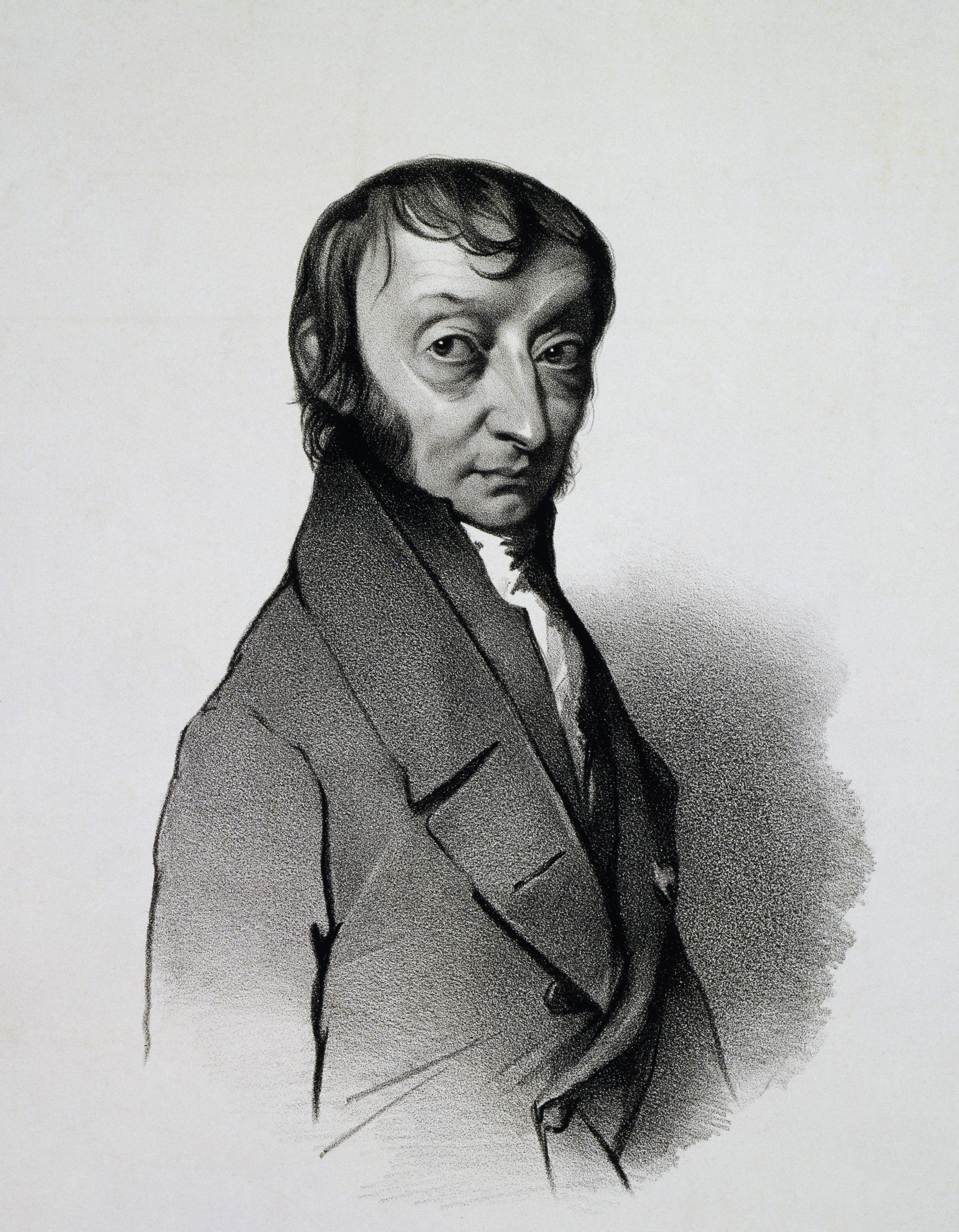 Amedeo Avogadro - chemist